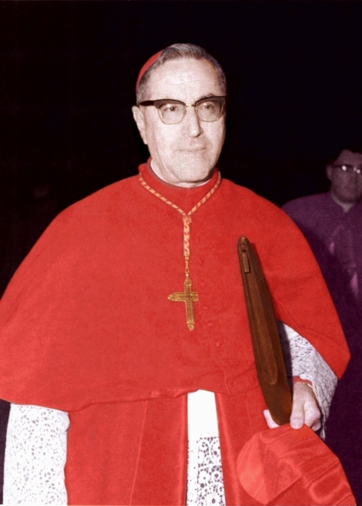 Il Cardinale Arcivescovo di Genova Giuseppe Siri a Roma durante il Concilio Vaticano II.